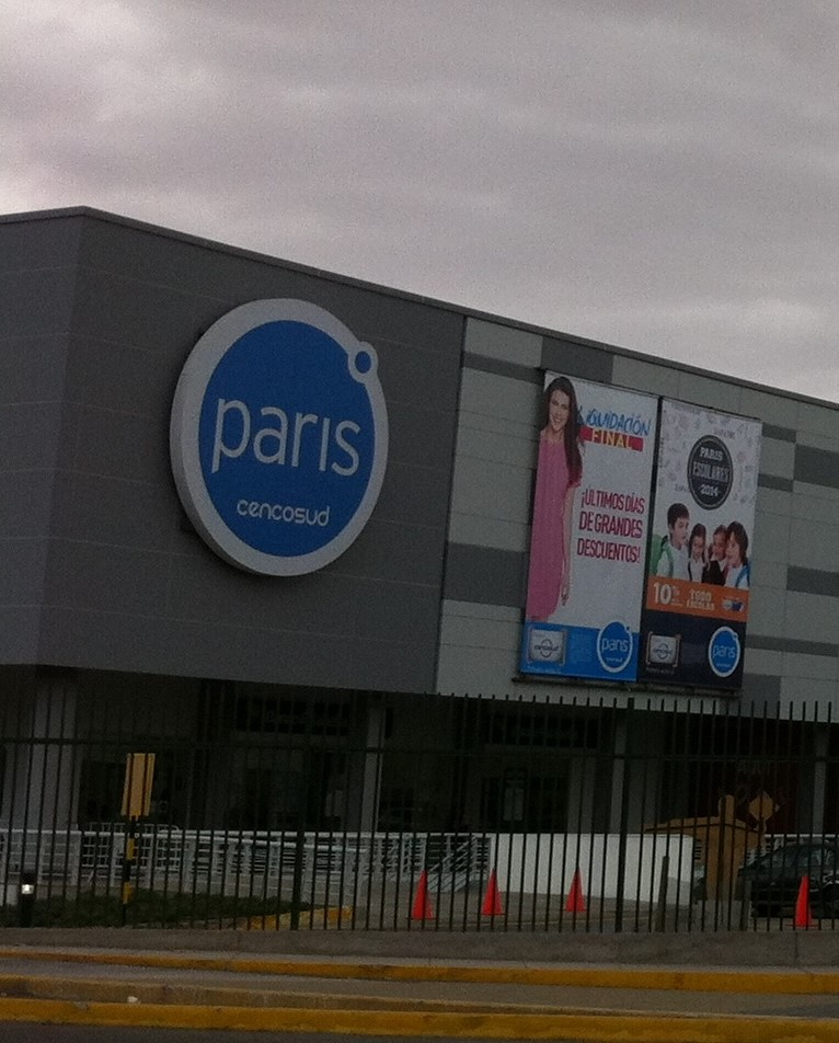 Tienda Paris en Ica, Perú